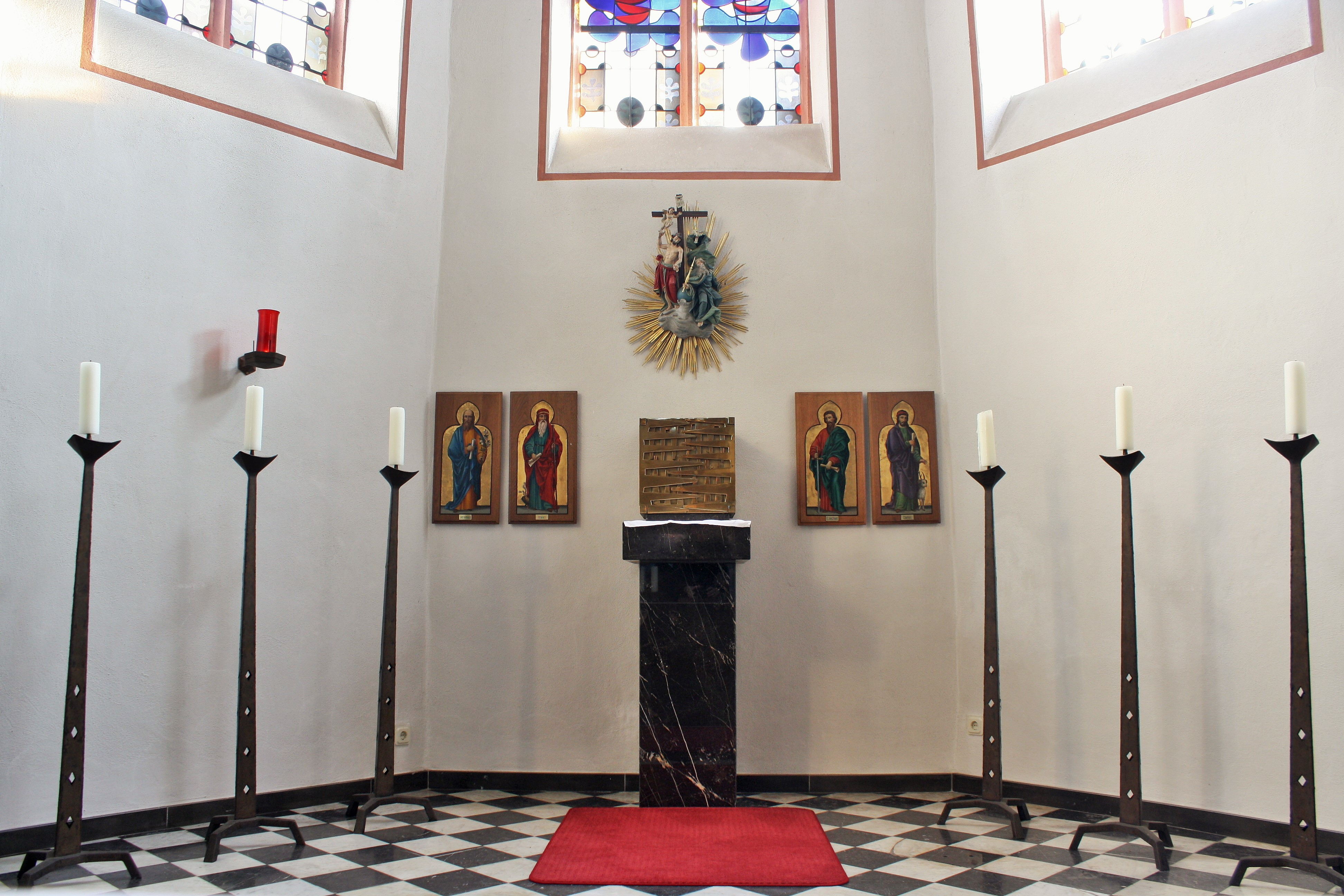 Tabernakel mit im Nazarener-Stil gehaltenen Gemälden des neugotischen Hochaltares